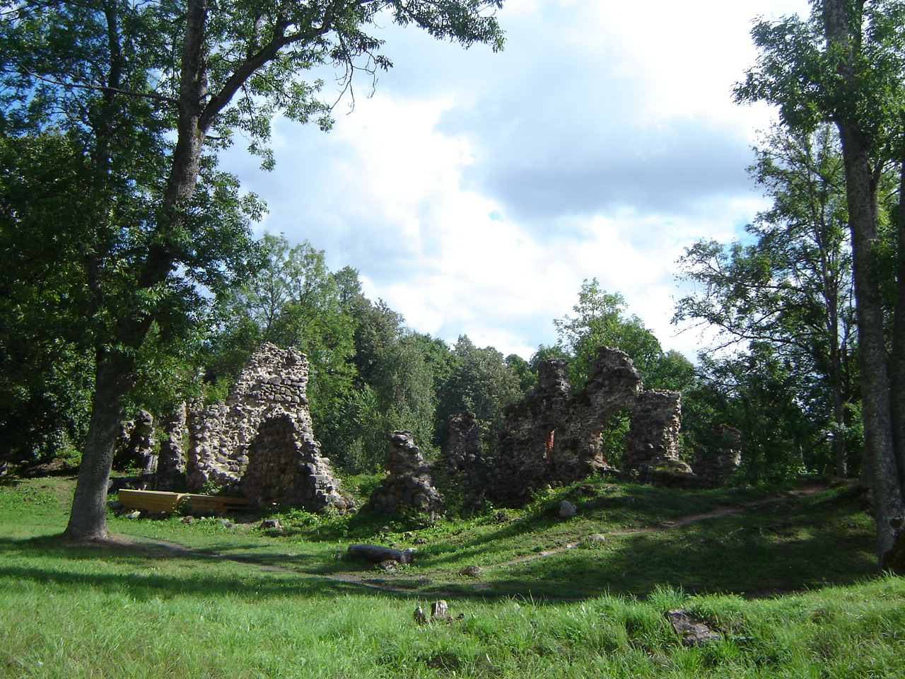 Helme ordulinnuse sisehoov.